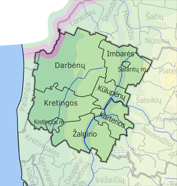 Kretingos rajono savivaldybės seniūnijos (lt::image:LietuvosSeniunijos.png)